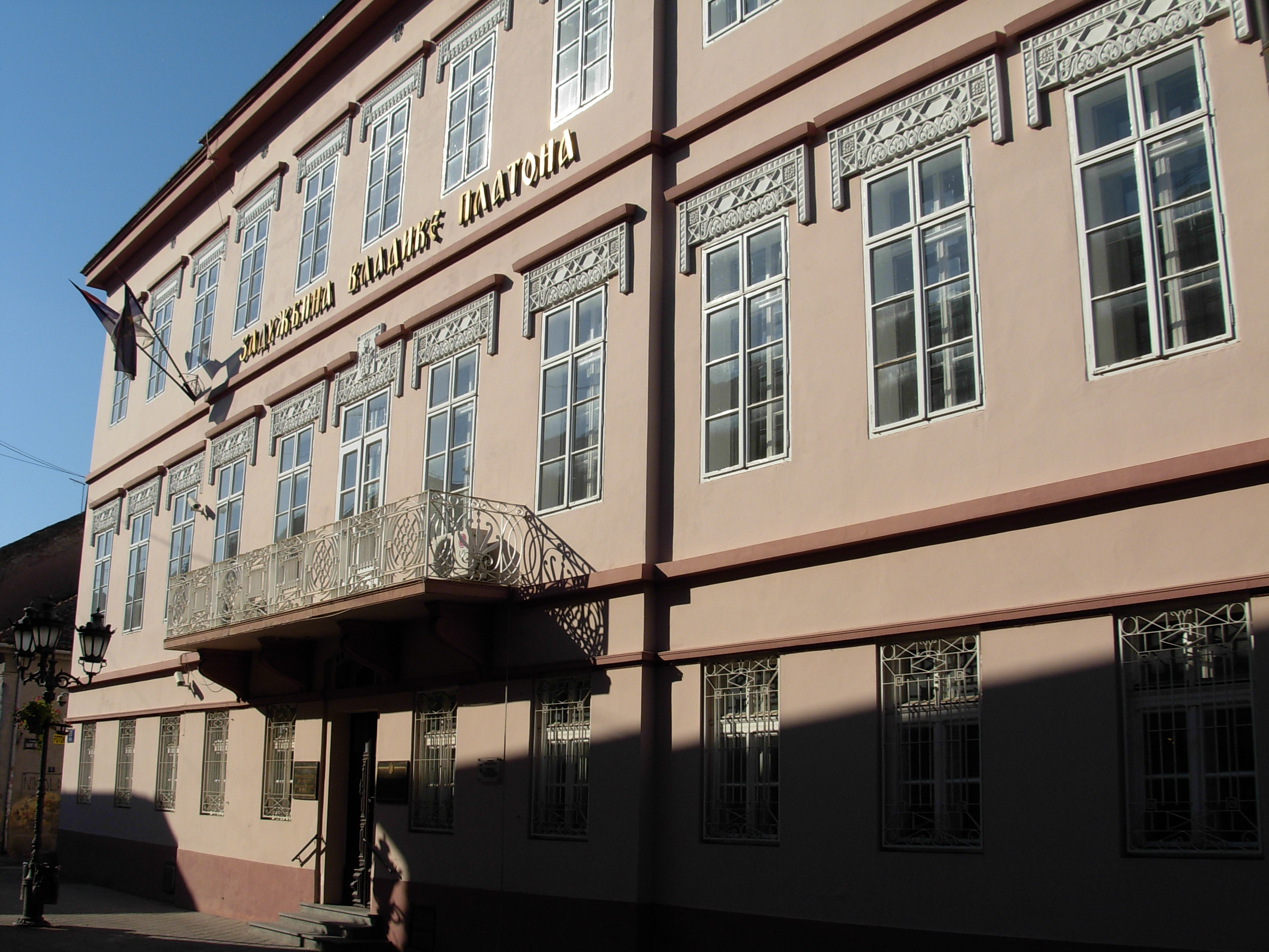 Zgrada SANU, odeljak u Novom Sadu.